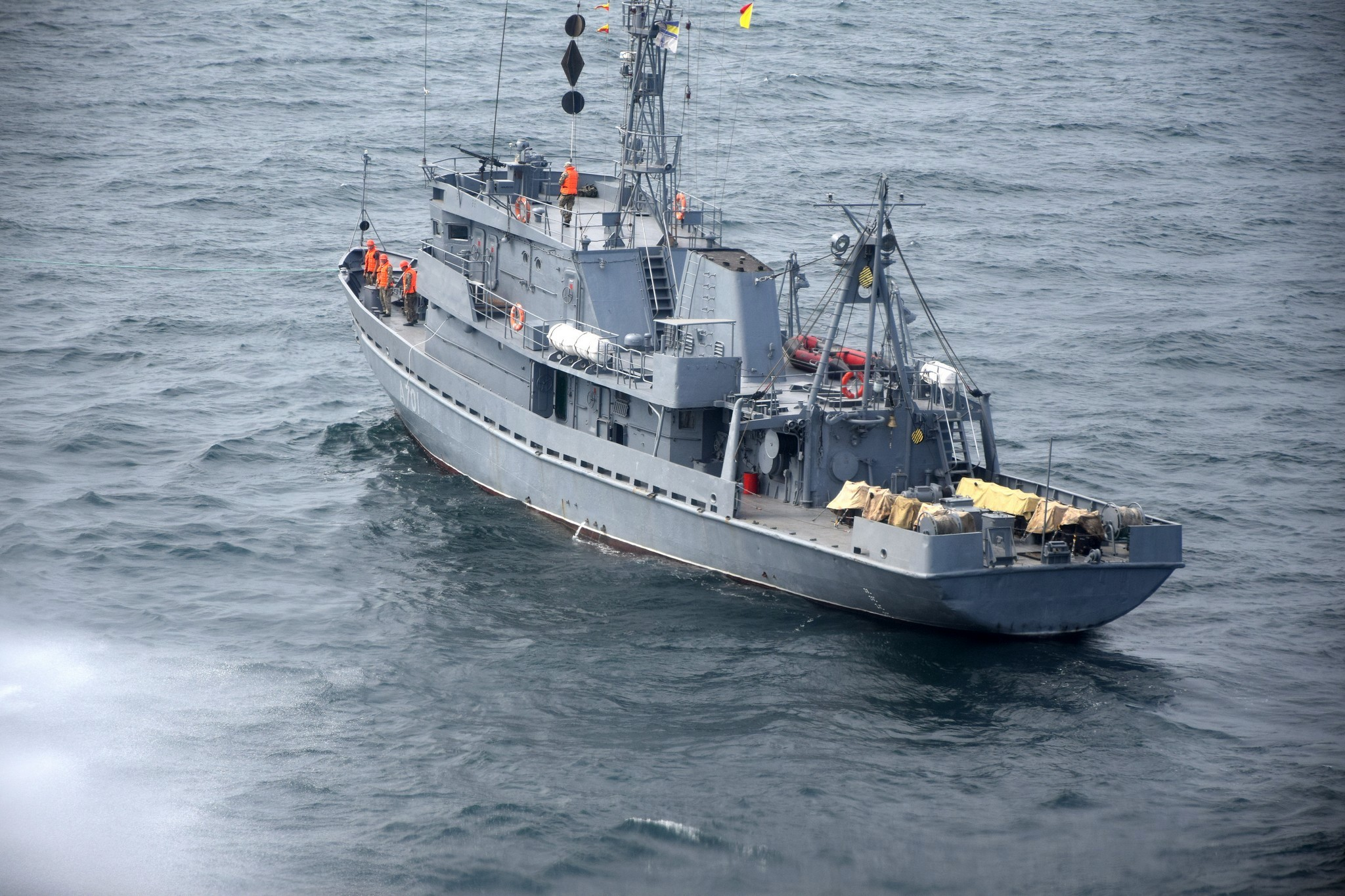 Навчання командування ВМС ЗС України «Шторм – 2018»: дії артилерії, авіації та інженерних підрозділів під час оборони морського узбережжя В рамках спільного командно-штабного навчання Командування Військово-Морських Сил ЗС України з іншими військовими формуваннями та правоохоронними органами “Шторм 18” було проведено операцію щодо оборони морського узбережжя. Окремий артилерійський дивізіон національних ВМС здійснив вогневе ураження морських цілей артилерійськими системами гаубичного типу Д-20. Інженерні підрозділи виконали завдання з облаштування протидесантних мінних загороджень та аерозольного маскування вогневих позицій, а морська авіація виконала бомбометання. Варто зазначити, що злагоджені дії задіяних військ (сил) показали налагоджену роботу командного пункту управління навчання та підвищення взаємосумісності з іншими органами управління. Прес-центр Командування ВМС ЗС України